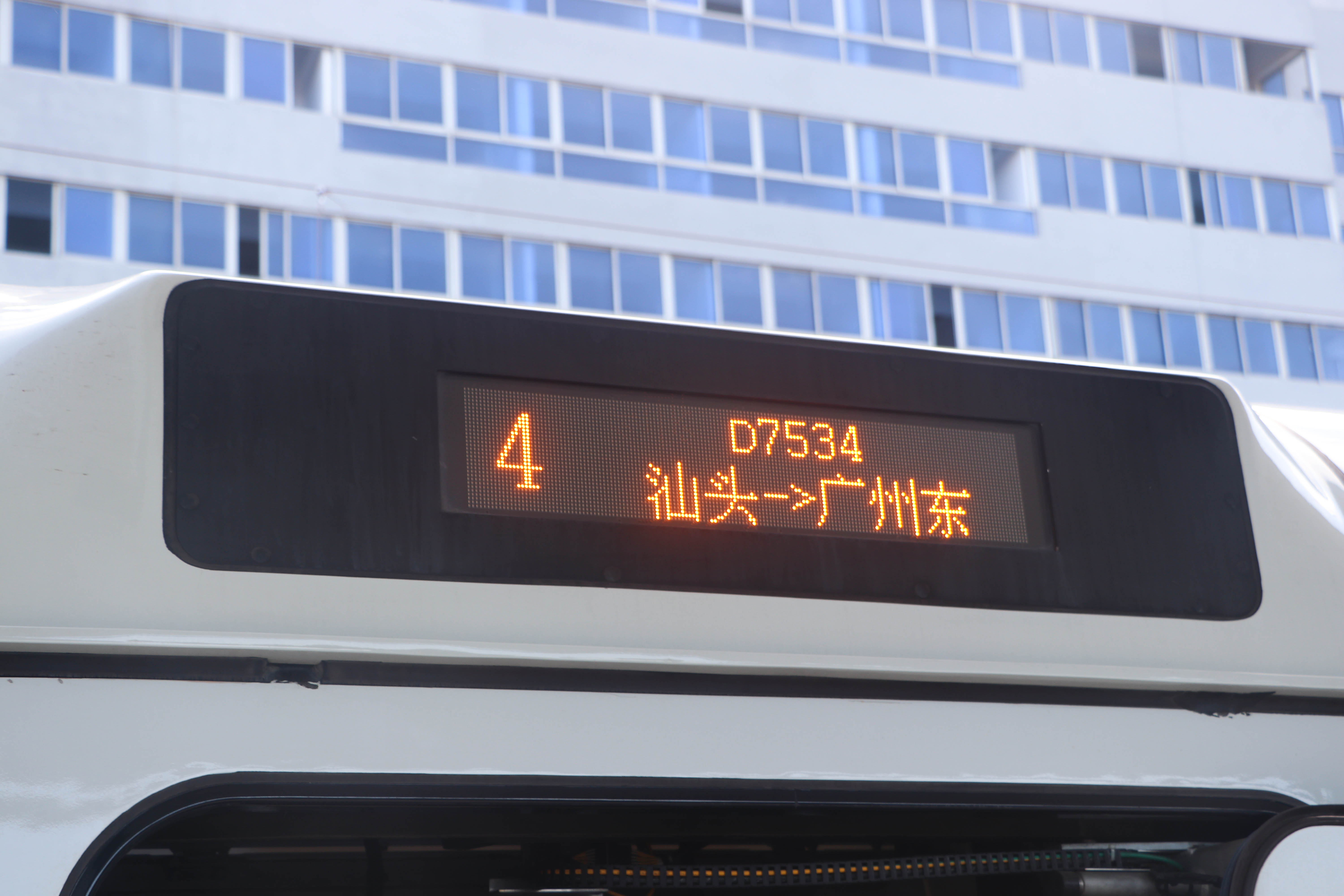 D7534/5次列车电子显示牌